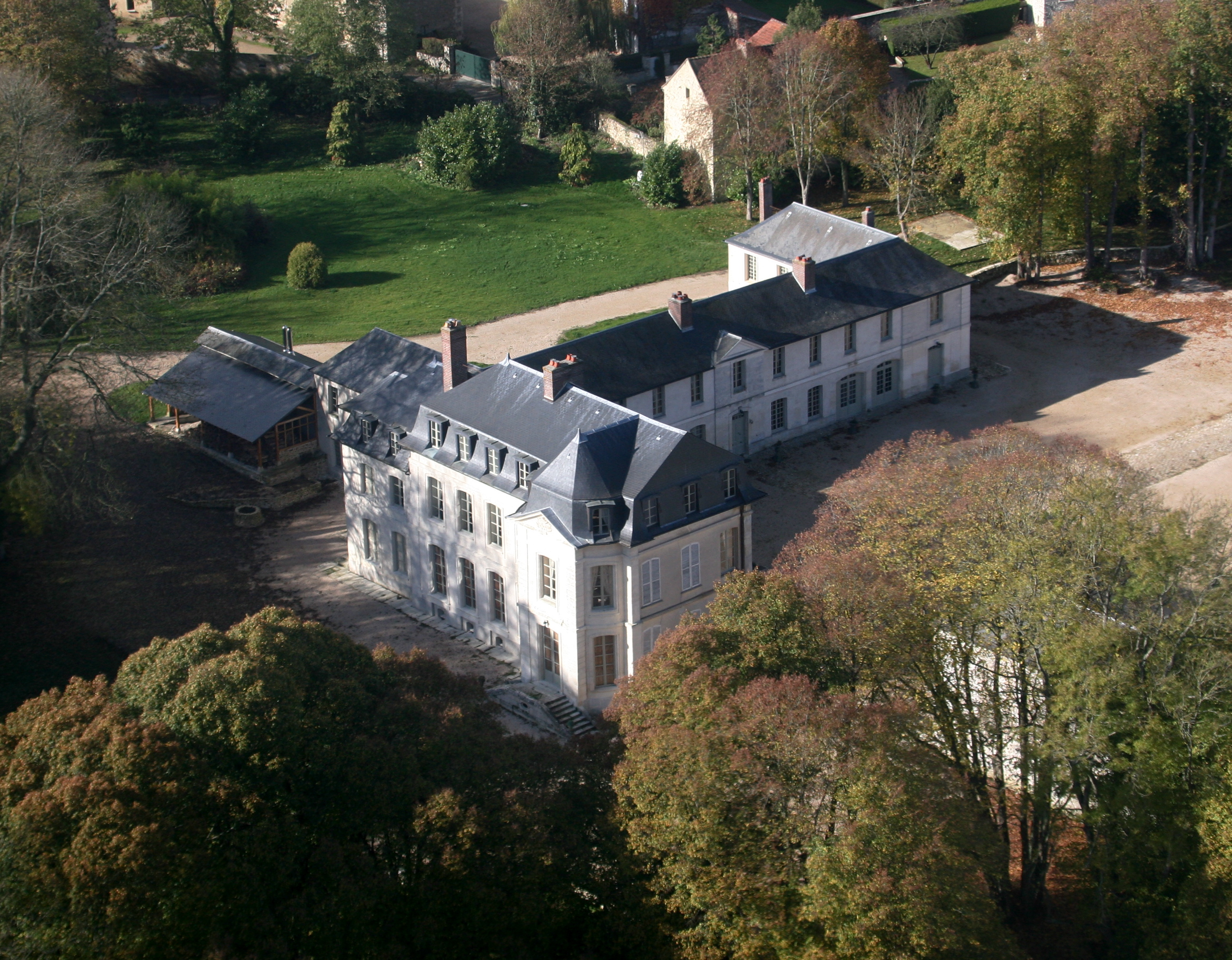 vue aerienne du Chateau de Maudetour